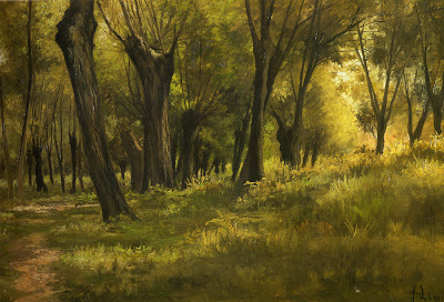 Agustín Lhardy Garrigues (20 de agosto - 1847 Madrid - 3 de abril de 1918 Madrid) fue un pintor paisajista y cocinero propietario del restaurante Lhardy ubicado en Madrid. Fue alumno del pintor Carlos Haes que le influyó notablemente en su carrera pictórica posterior. Como gastrónomo y cocinero tuvo una gran labor continuadora de su padre, divulgador y promotor de la gastronomía madrileña.